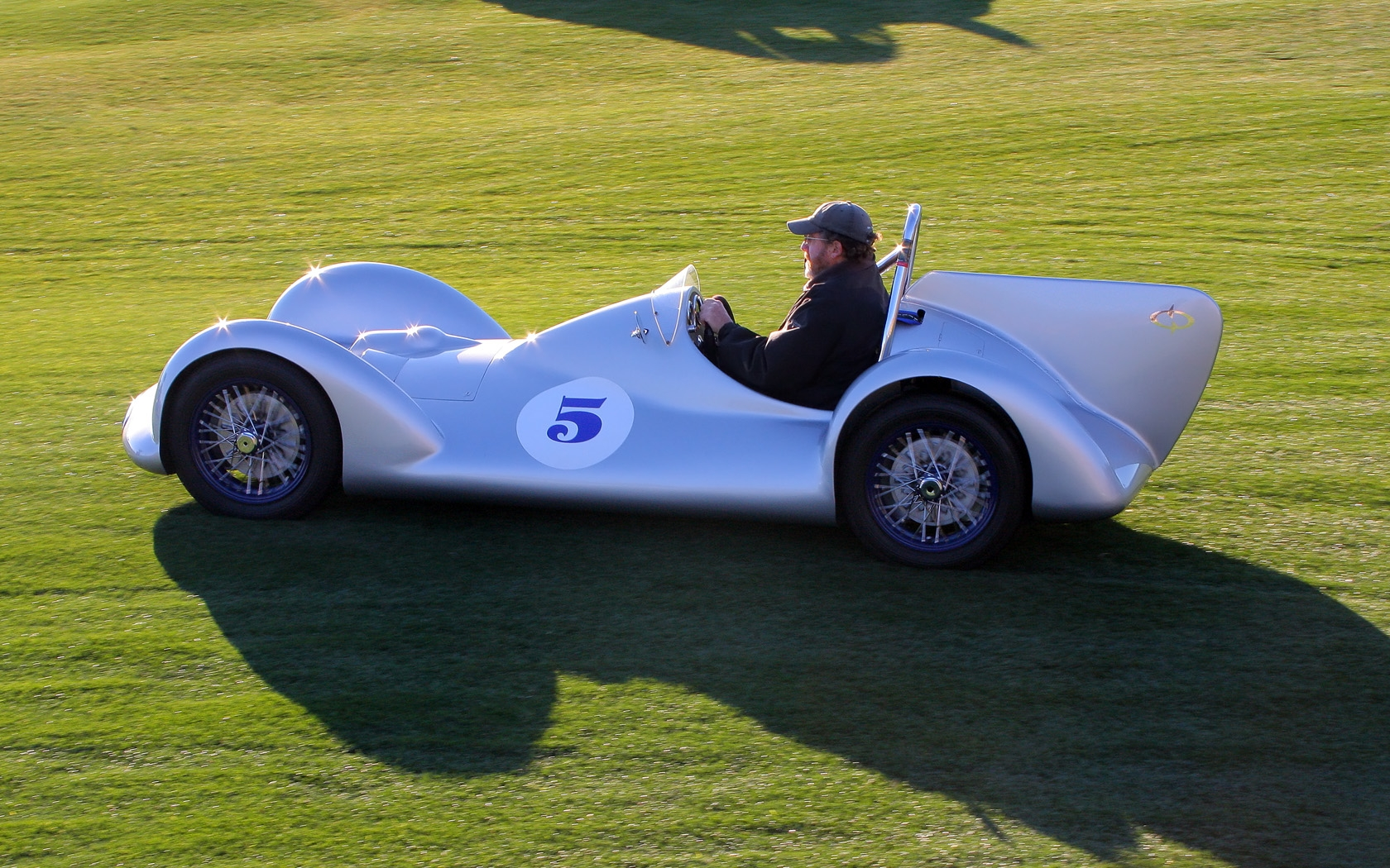 2011 Desert Classic, La Quinta, CA